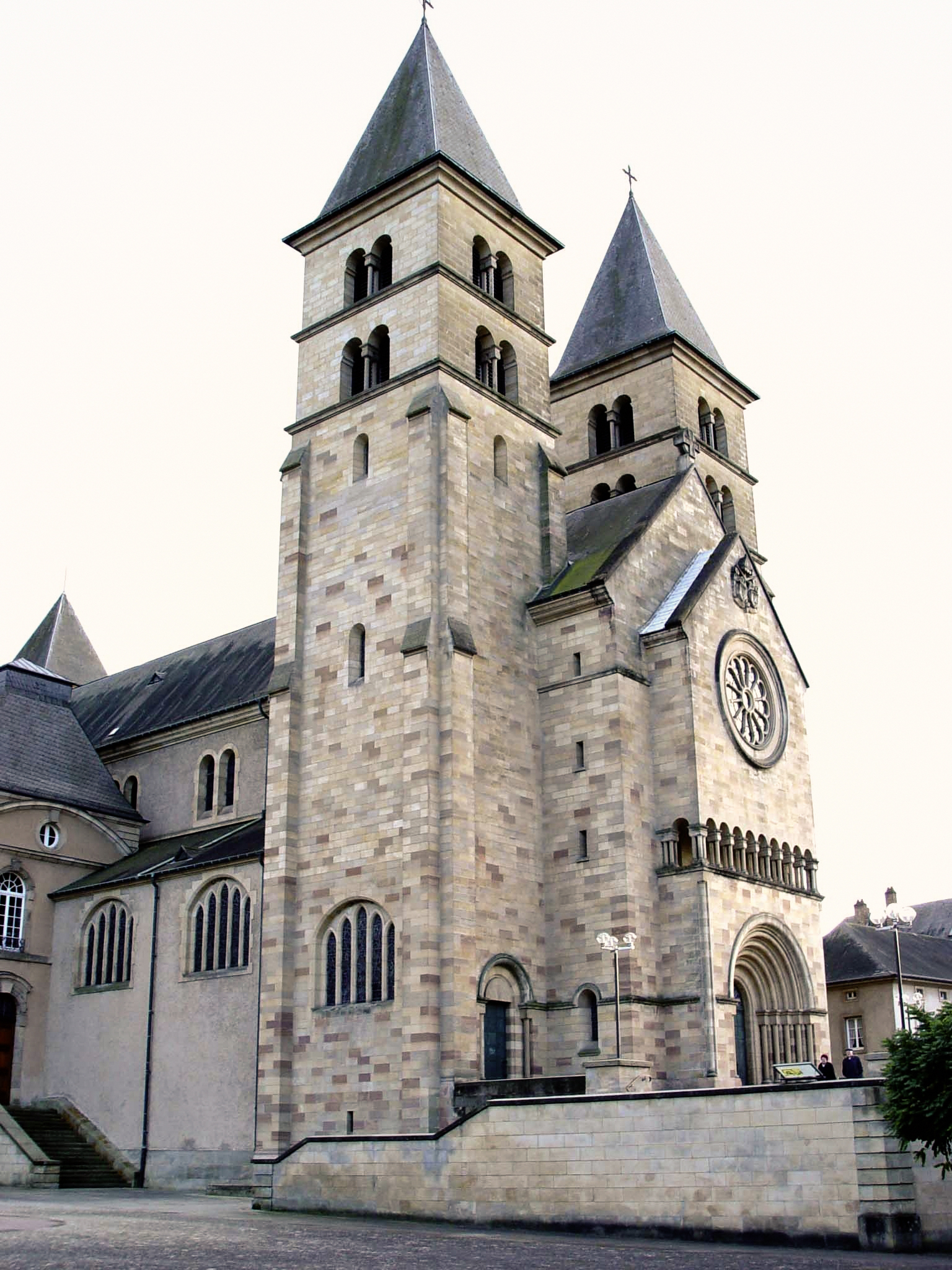 Basilika Iechternach. (Iwwerschafte Versioun vum File:Iechternach Basilika.jpg).